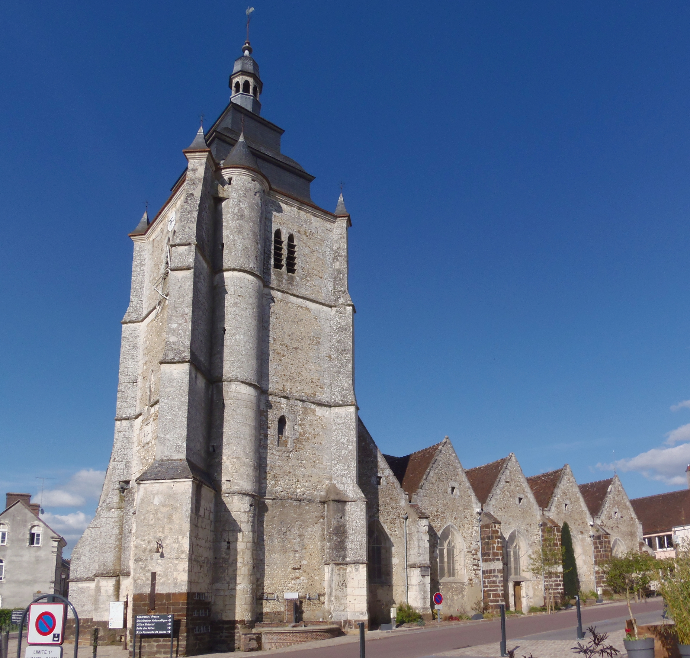 Bretoncelles (Normandie, France). L'église Saint-Pierre.